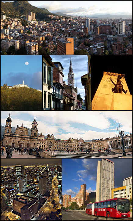 Collage de fotos de Bogotá, tomadas de diversos autores de 1. Panorámica del norte de Bogotá 2. Cerro de Monserrate 3. Barrio La Candelaria (Centro Histórico) 4. Monumento a los Héroes 5. Plaza de Bolívar 6. Panorámica nocturna del Centro Internacional 7. Bus articulado de TransMilenio a su paso por el centro de Bogotá